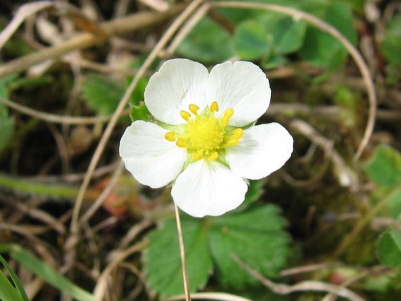 Hügel-Erdbeere Fragaria viridis, Rügen